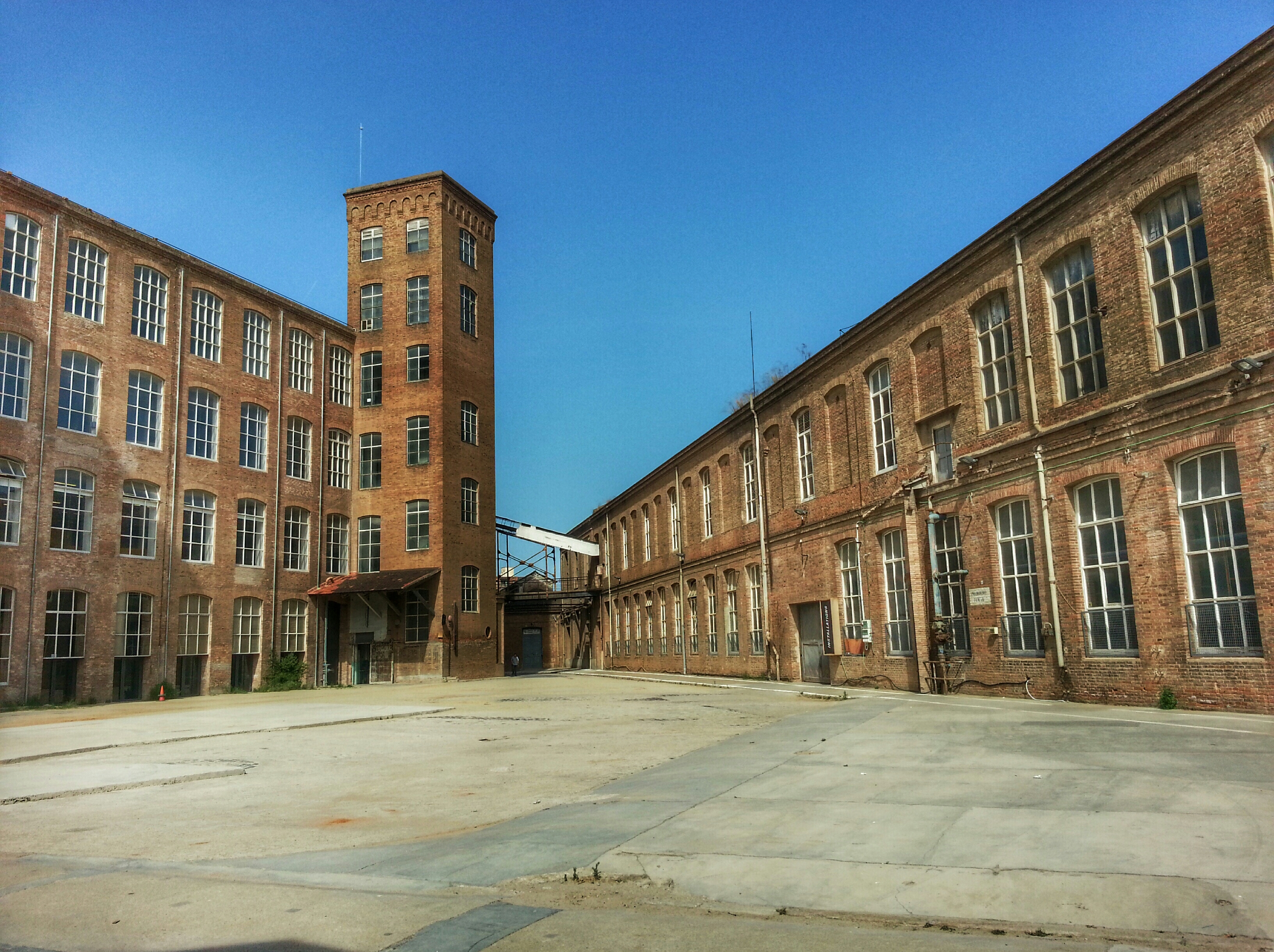 Imatges de l'exposició Descobreix les 10 Barcelones, una exposició fotogràfica que explora els racons més singulars i menys coneguts dels deu districtes barcelonins. Reconegudes amb la seva incorporació al banc d'imatges de la Viquipèdia, les 100 imatges que componen la mostra s'han escollit entre les més de 3.000 presentades al concurs de fotografia mòbil convocat per a l'exposició. Es tracta d'un projecte col·laboratiu creat pels ciutadans per captar l'essència menys tòpica de la ciutat. Ho organitza: Ajuntament de Barcelona i Dive. Amb la col·laboració de Descobreix Catalunya, Instagramers i Amical Wikimedia.